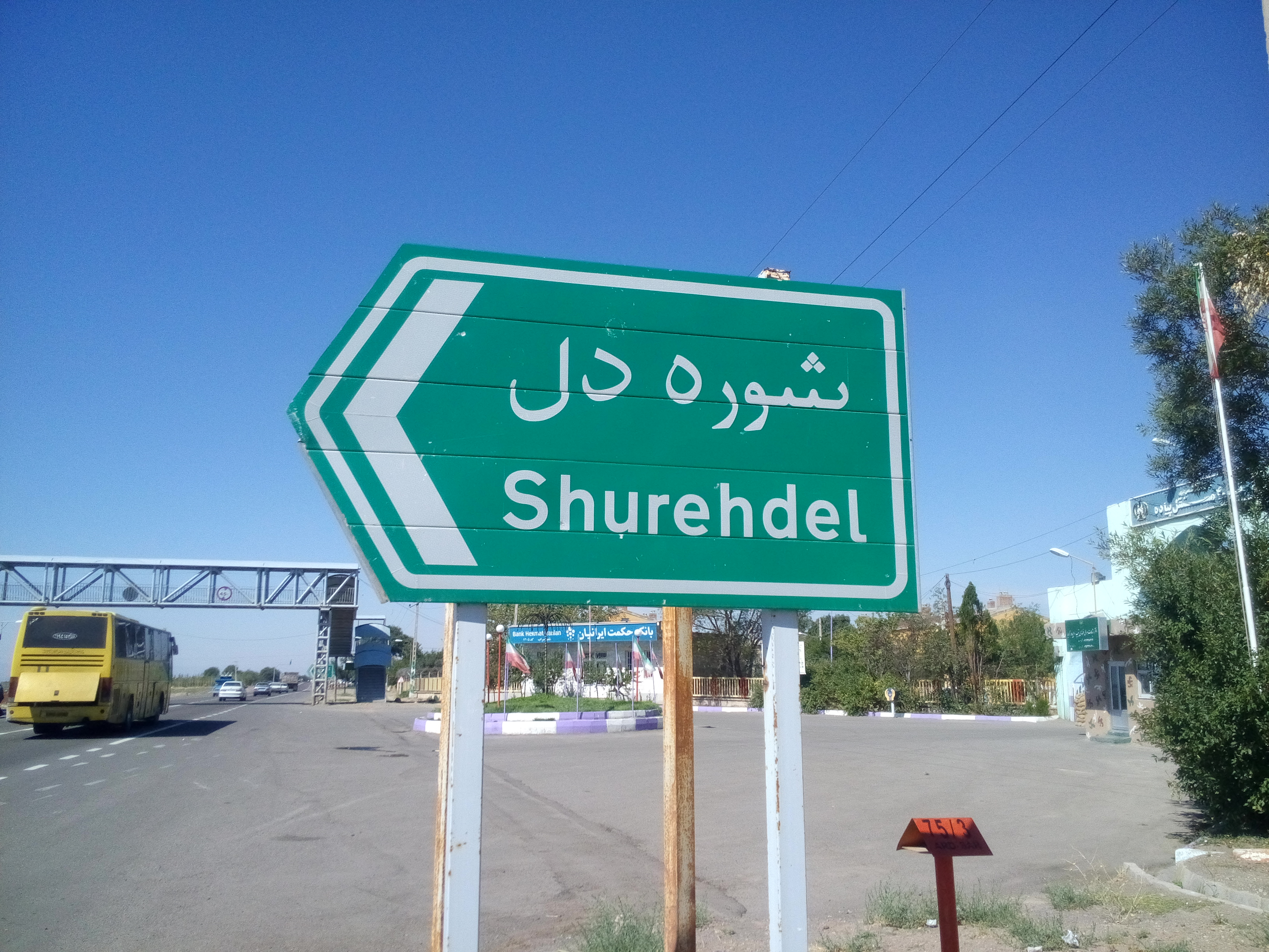 تابلو